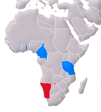 Lage Deutsch-Südwest-Afrikas (rot) und der anderen deutschen Kolonien in Afrika (blau) Location of German South-West Africa (red) and the other German colonies in Africa (blue)